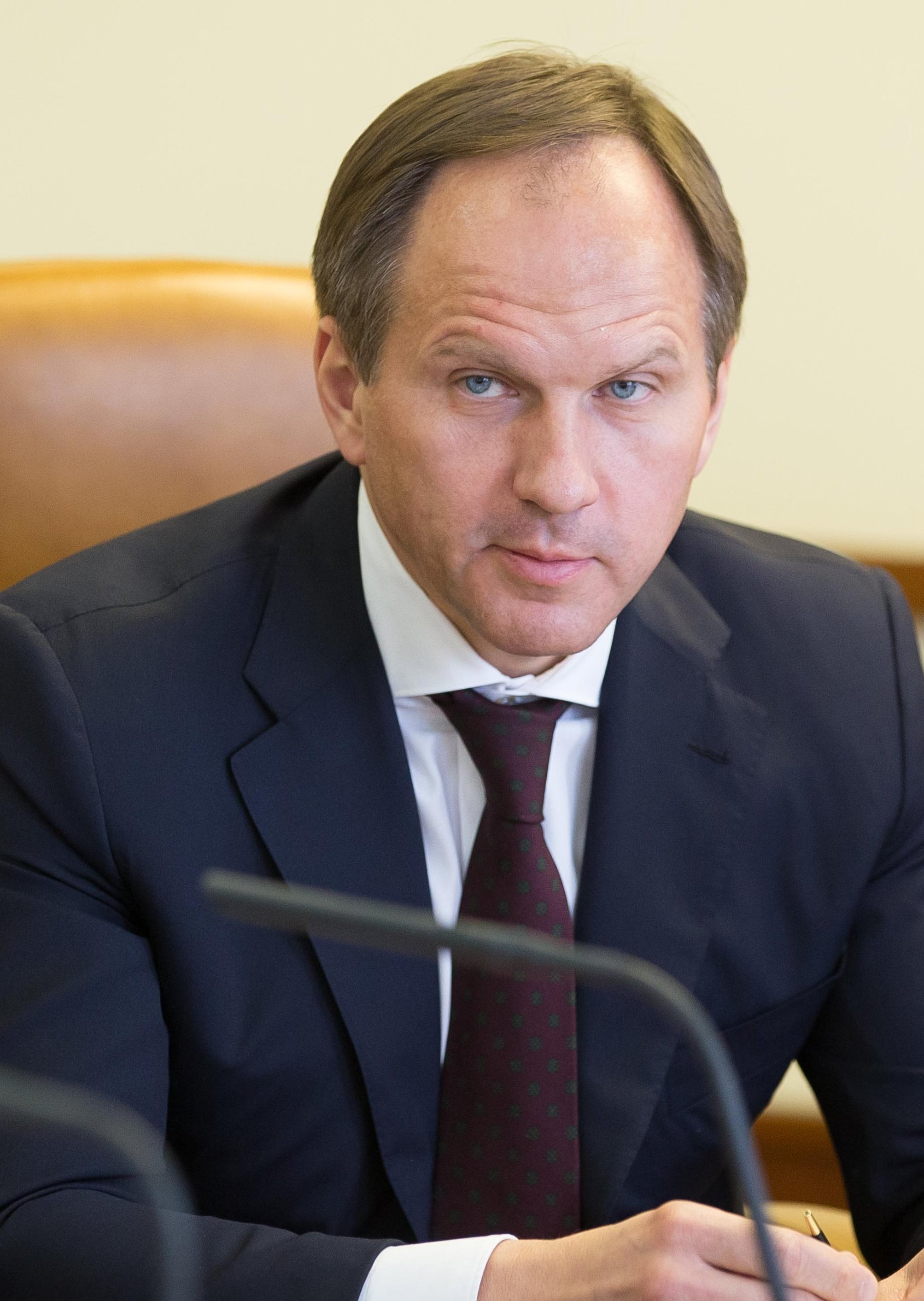 Лев Владимирович Кузнецов (род.1965) — российский государственный деятель